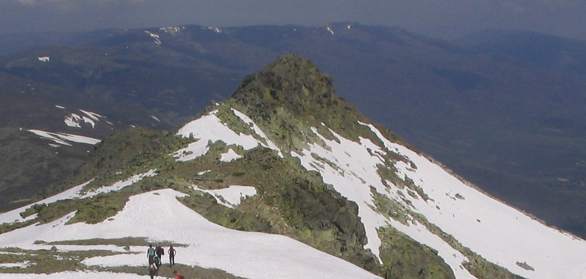 Risco de los Pájaros (Sierra de Guadarrama)